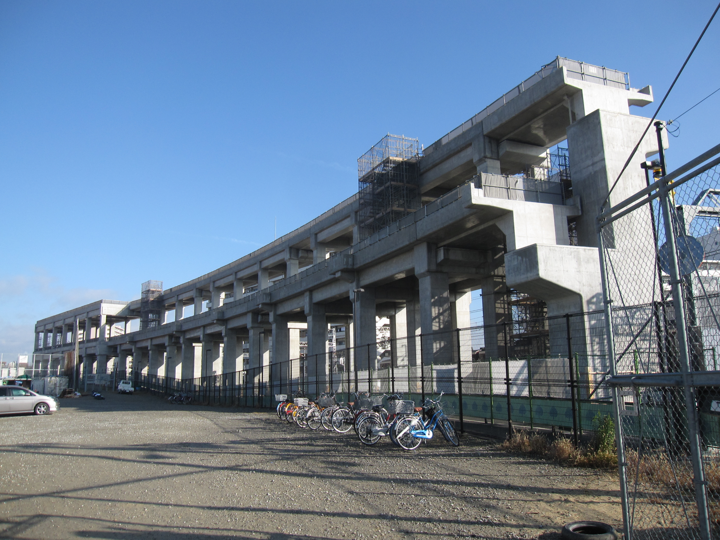 阪急電鉄千里線高架化(2012年12月撮影)